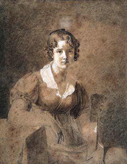 Stéphanie de Virieu, Autoritratto, posizione sconosciuta.